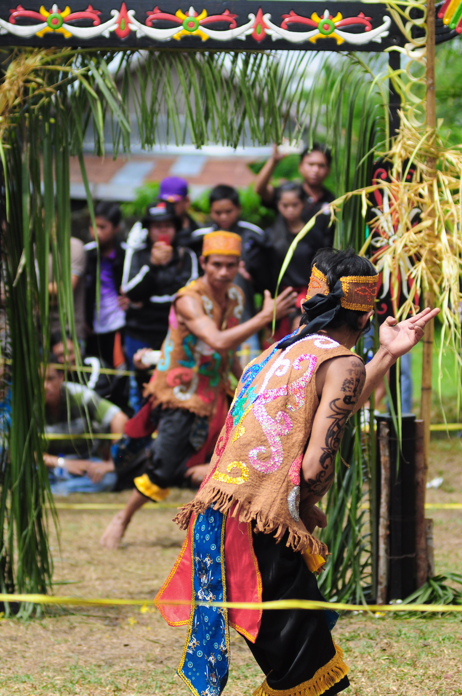 Atraksi Lawang sakepeng yang biasa di tampilkan dalam acara pernikahan ataupun menyambut tamu